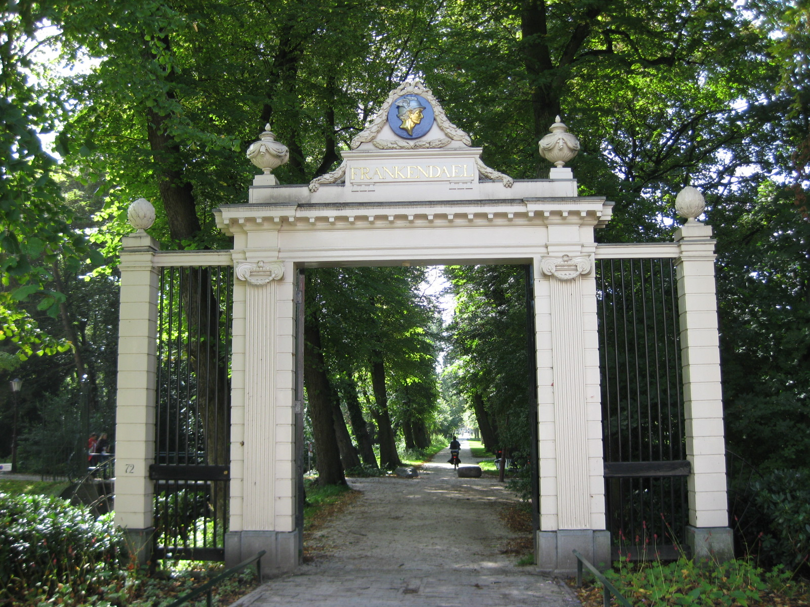 Toegangspoort Park Frankendael in Amsterdam